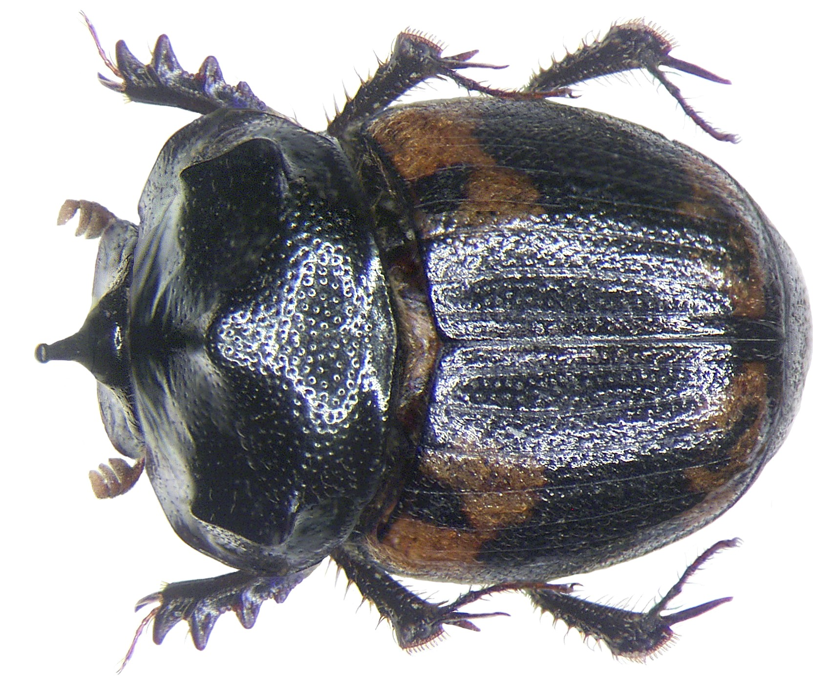 Familie: Scarabaeidae Grösse: 6,5 mm Fundort: Nepal, Kathmandu, Gorkhana leg. A.Skale, 2000; det. J.Schönfeld Foto: U.Schmidt, 2007